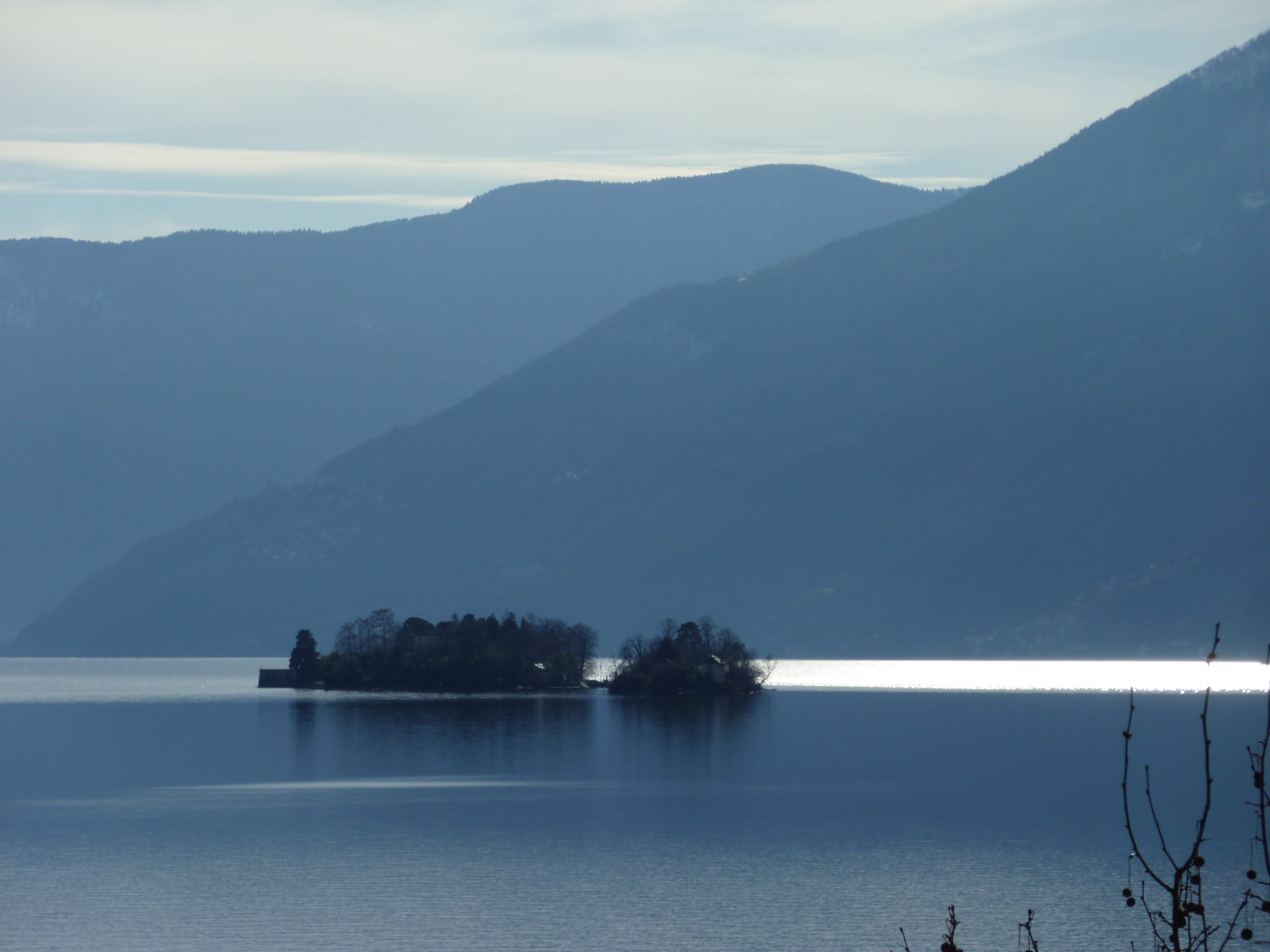 Isole di Brissago; Lage Maggiore